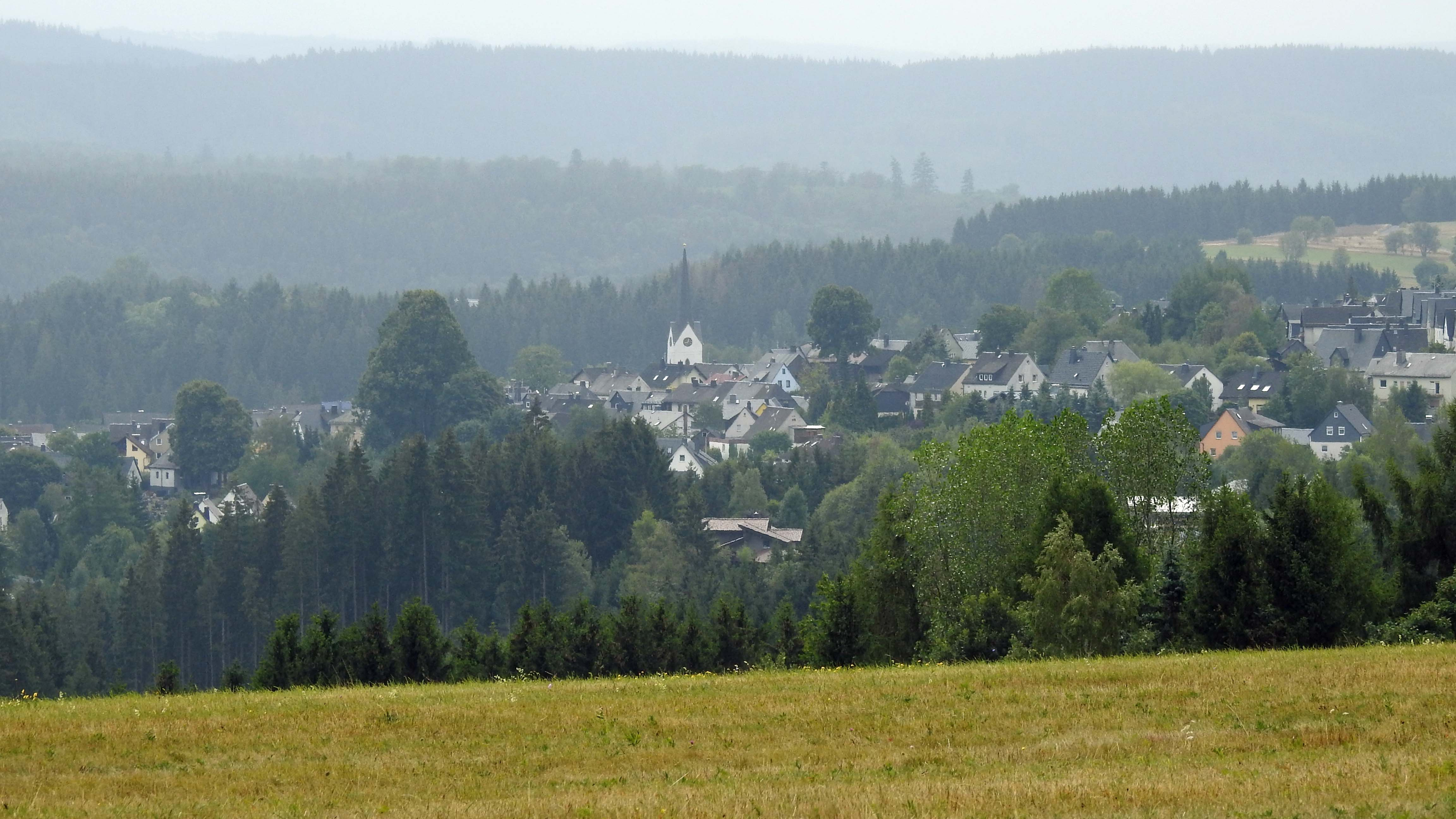 Nordhalben von Norden